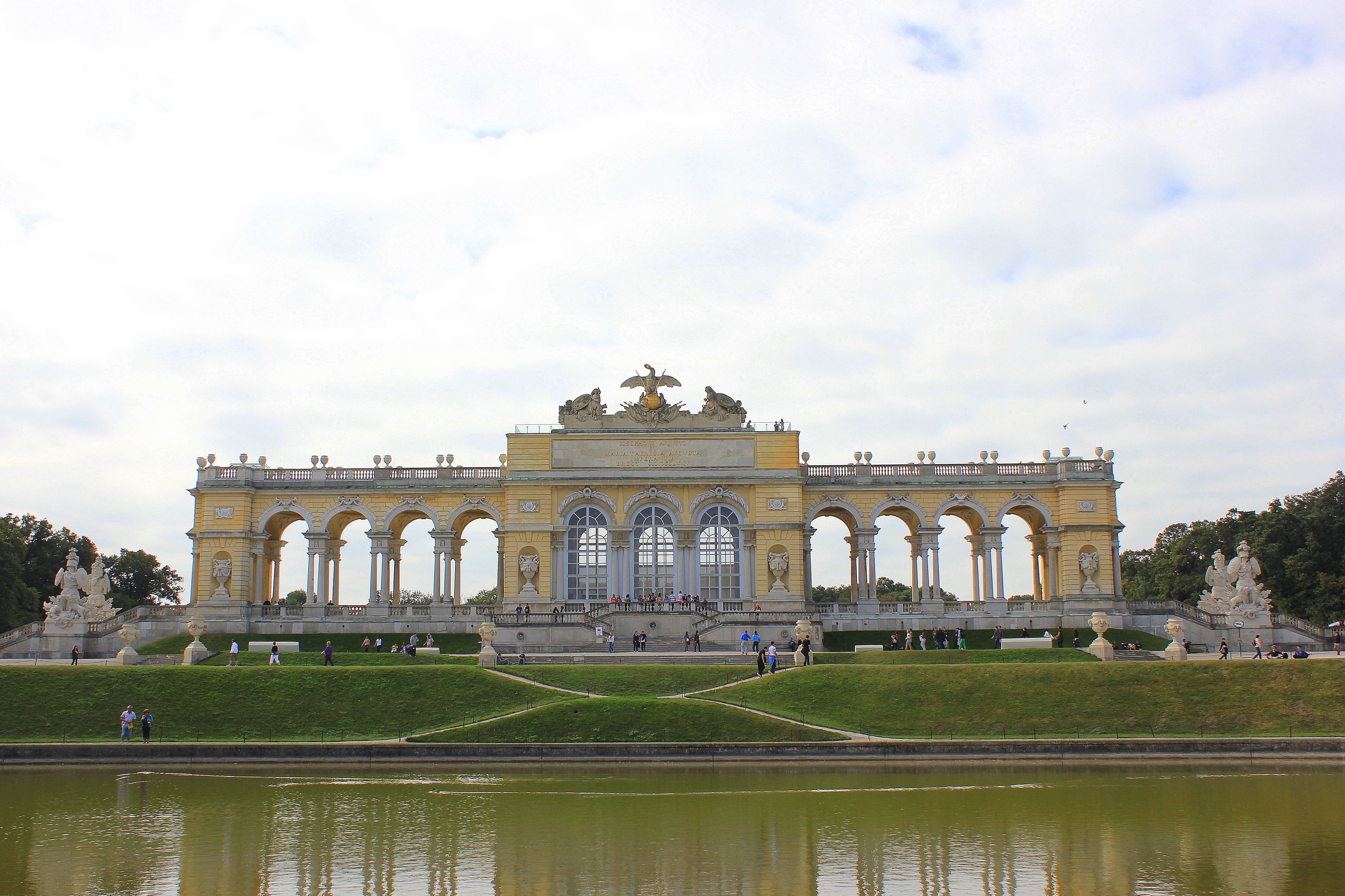 Glorieta de Palacio de Schönbrunn